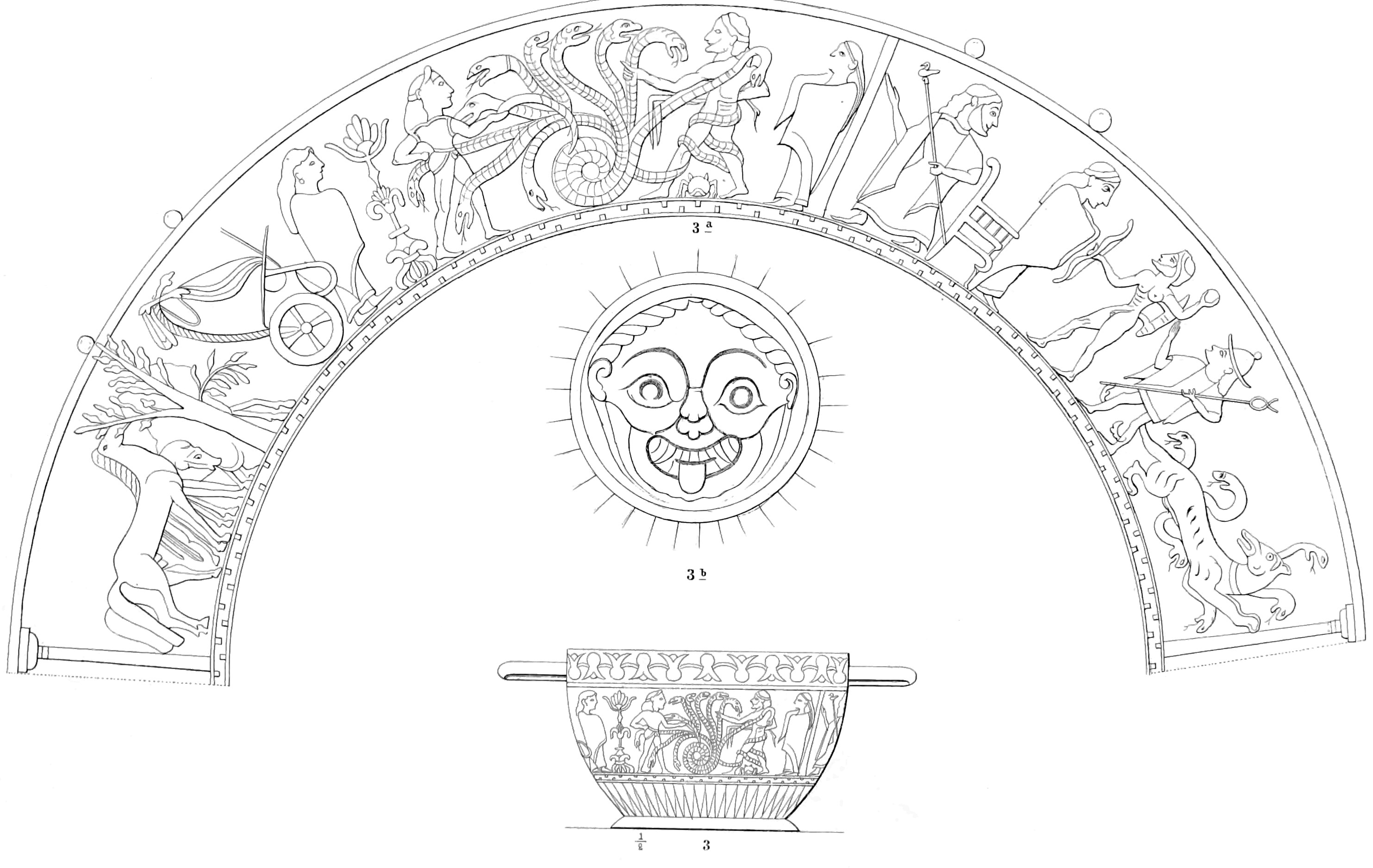 Bemaltes Thongefäß aus Argos mit zwei Scenen, Herakles und die Hydra und Herakles im Hause des Hades.